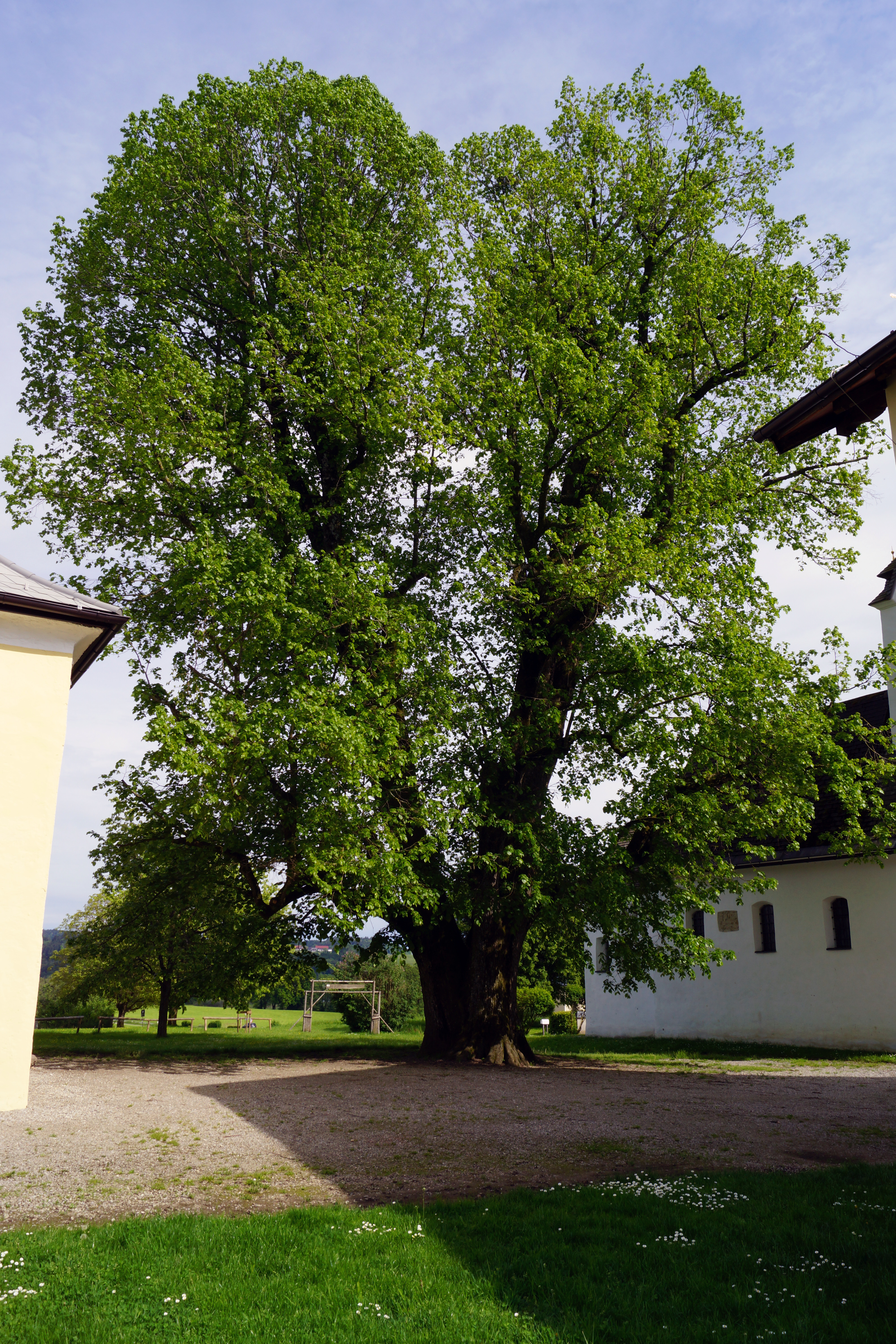 Die Sommerlinde im Weiler Zellhof befindet sich nördlich der Obertrumer Landesstraße direkt am Grabensee. Zellhof ist ein Weiler in der Gemeinde Mattsee des Trumer Seenlandes im nördlichen Flachgau von Salzburg. Sie ist doppelstämmig und teilt sich in einer Höhe von etwa 3 Metern in mehrere Äste. This media shows the natural monument in Salzburg with the ID NDM00213.